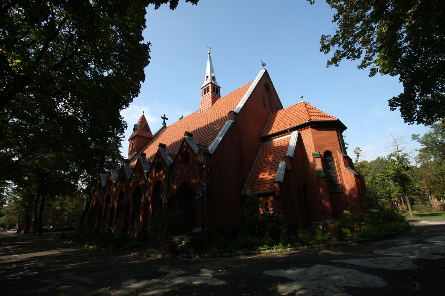 Międzyrzecz, kościół, ob. fil. p.w. Niepokalanego Poczęcia NMP, w zespole szpitala psychiatrycznego, mur., 1901-1914, ul. Poznańska 109 (zabytek nr rejestr. 391/92)